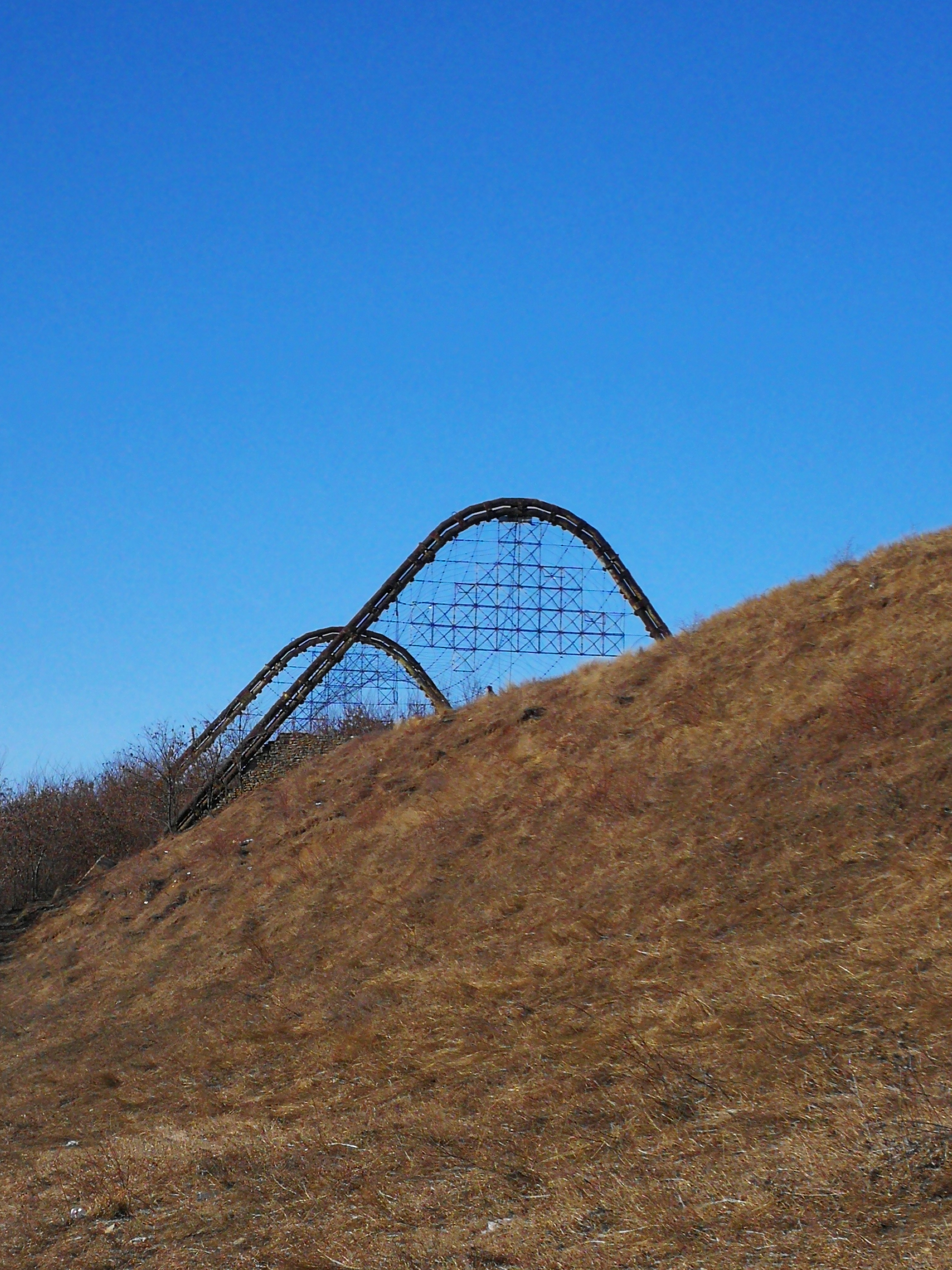 Situl arheologic "Cetatea de la Cotnari" este situat pe Dealul Catalina, in partea de nord-vest a localităţii Cotnari, făcând parte din masivul Dealul Mare-Hârlău. În secolele IV-III î.Hr., întregul platou a fost amenajat defensiv prin construirea unei cetăţi geto-dacice şi a altor elemente exterioare de fortificaţie. Intre anii 1980 şi 1985 a fost construit un muzeu de sit, care proteja secţiunea deschisă de arheologi în valul de apărare de pe latura sud-vest. Construcţia a fost realizată dintr-un schelet metalic şi o reţea de cabluri cu ochiuri pătrate, în care au fost dispuse plăci de plastic transparent. Din nefericire, datorită condiţiilor nefavorabile de pe Dealul Cătălina (vânt puternic aproape tot timpul anului), muzeul a avut de suferit, multe dintre plăcile de plastic fiind smulse de vânt. După 1990, distrugerea a fost accentuată de factorul antropic local, astfel că astăzi a mai rămas în picioare doar scheletul metalic. (sursa Historia.ro)